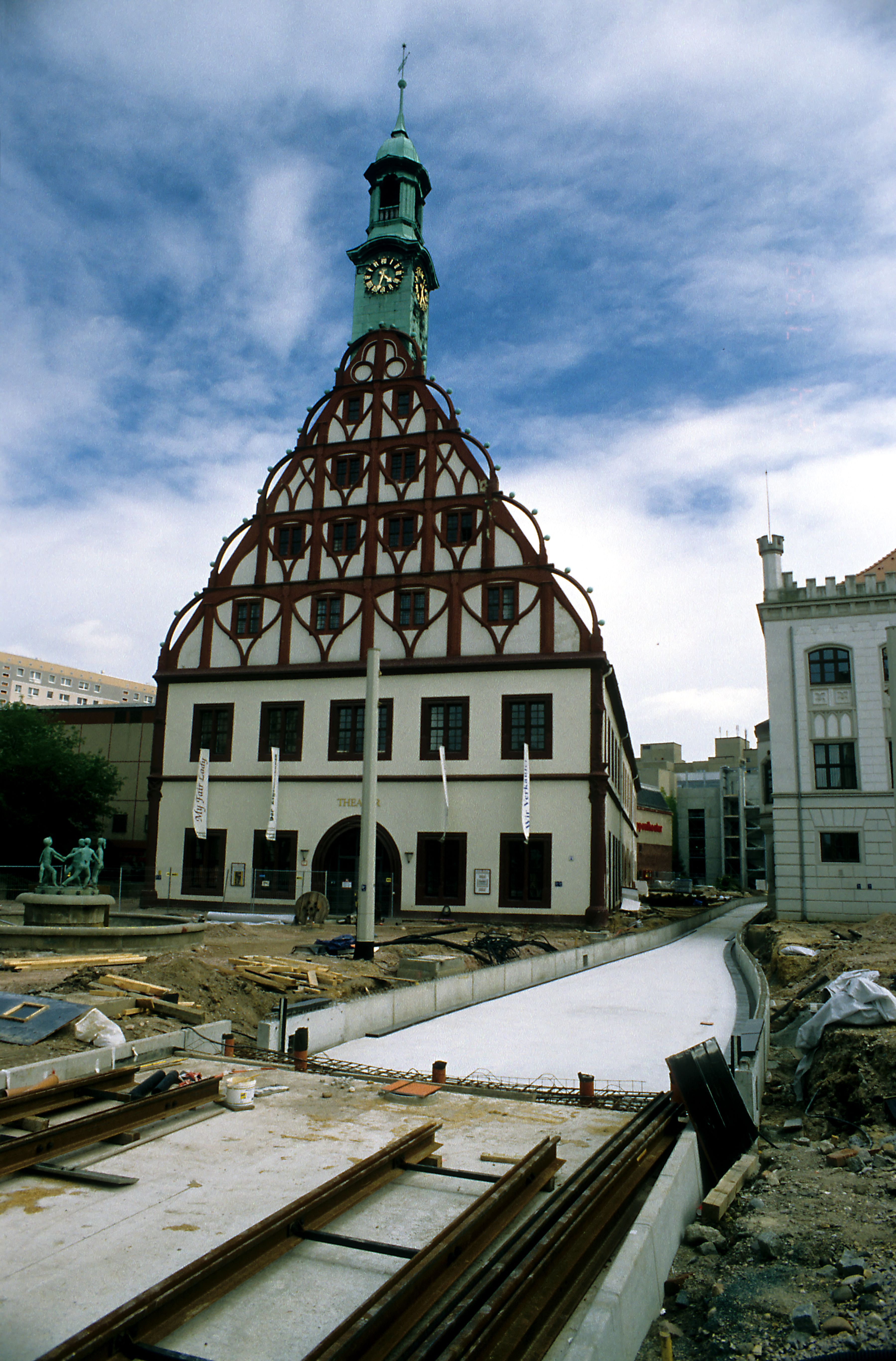 elastische Fahrbahnlagerung mit Masse-Feder-System